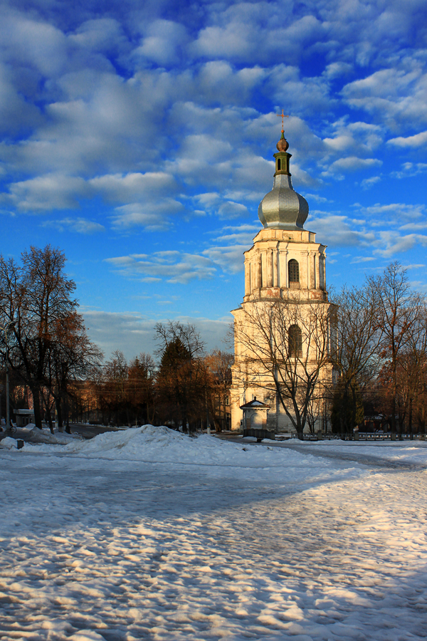 Дзвіниця Вознесенського собору (мур.), Переяслав-Хмельницький, вул. Г.Сковороди, 54